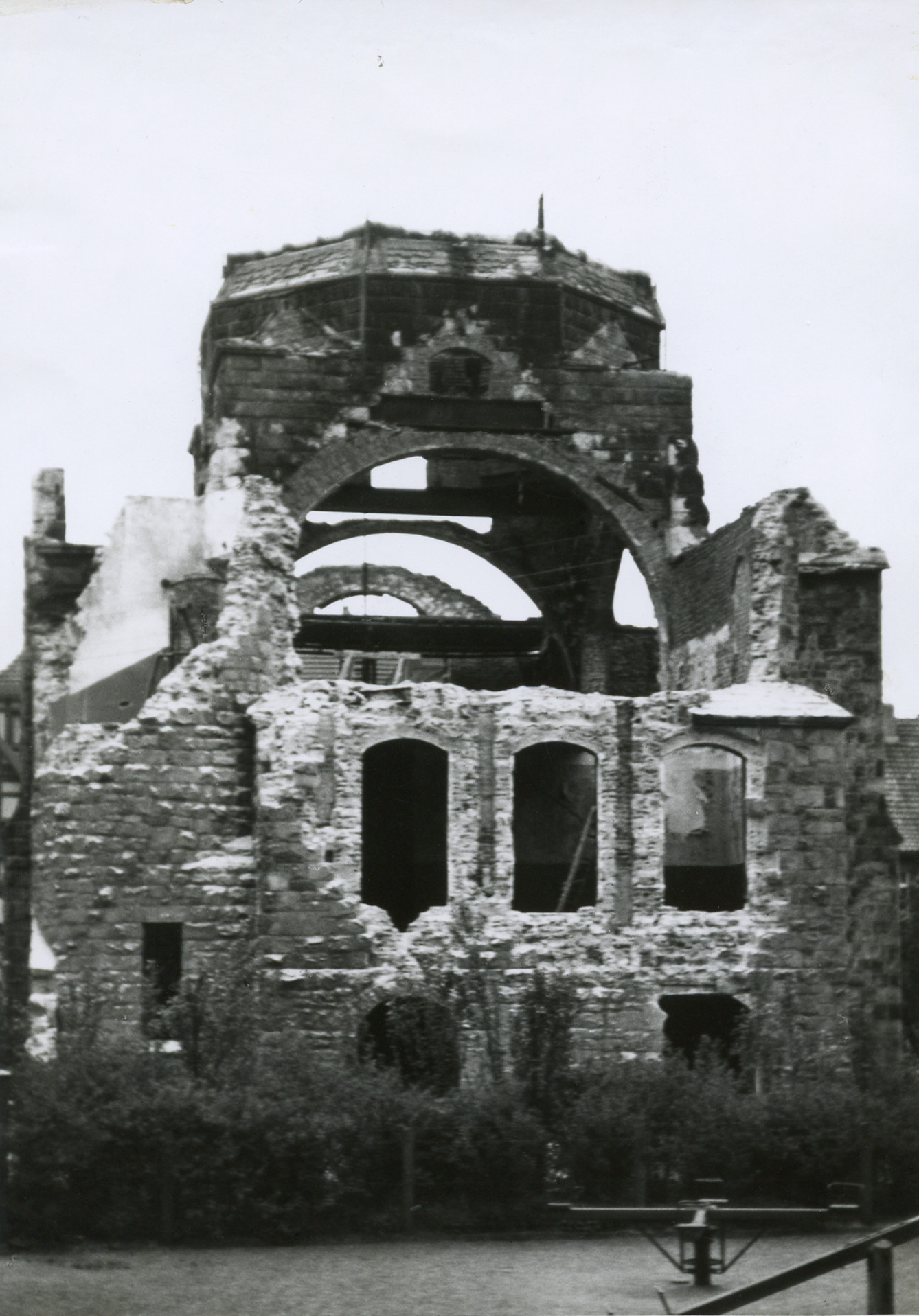 Synagoge in Detmold nach der Reichspogromnacht